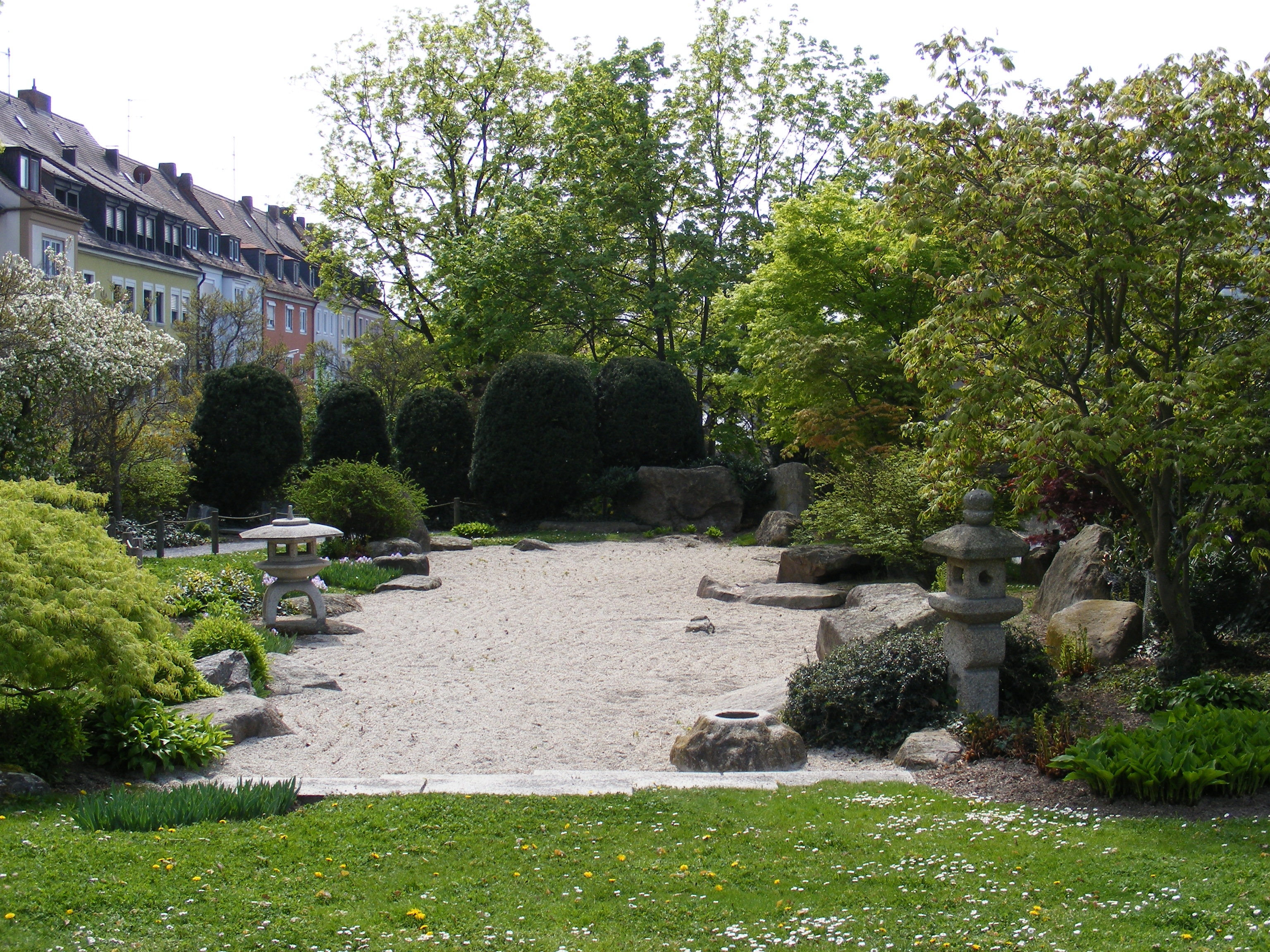 Würzburg - Zen-Garten "Ômi no niwa" am Kranenkai.